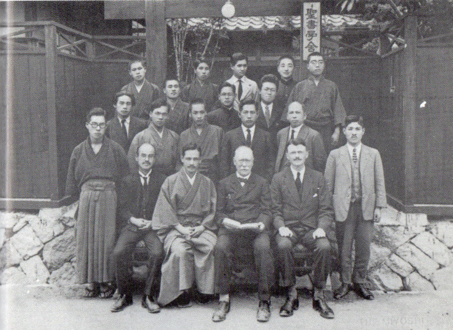 日本伝道隊の神戸市御影の聖書学舎の教授陣と神学生